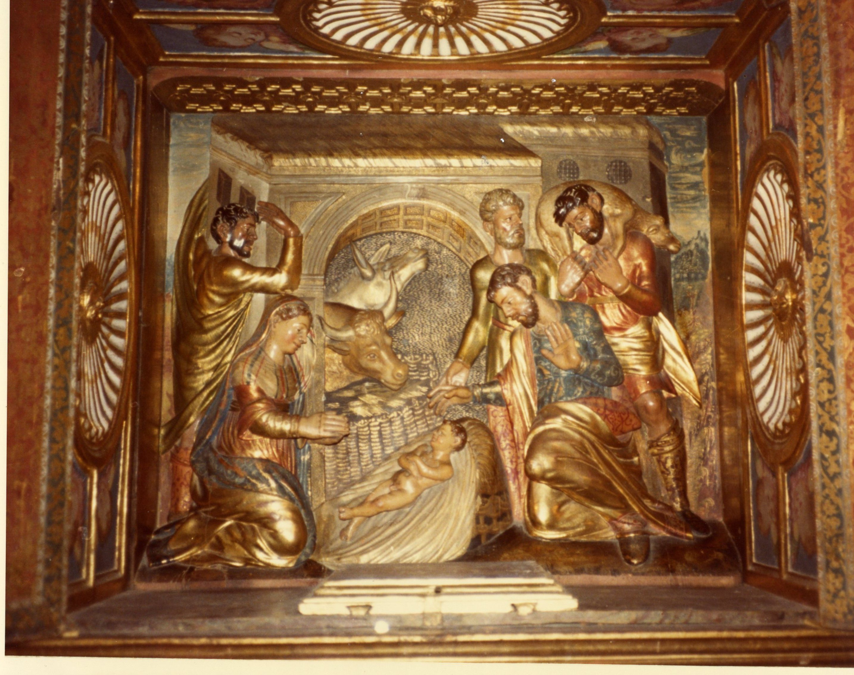 Sagrario policromado, protegido con dos puertas, en la iglesia de Malanquilla.